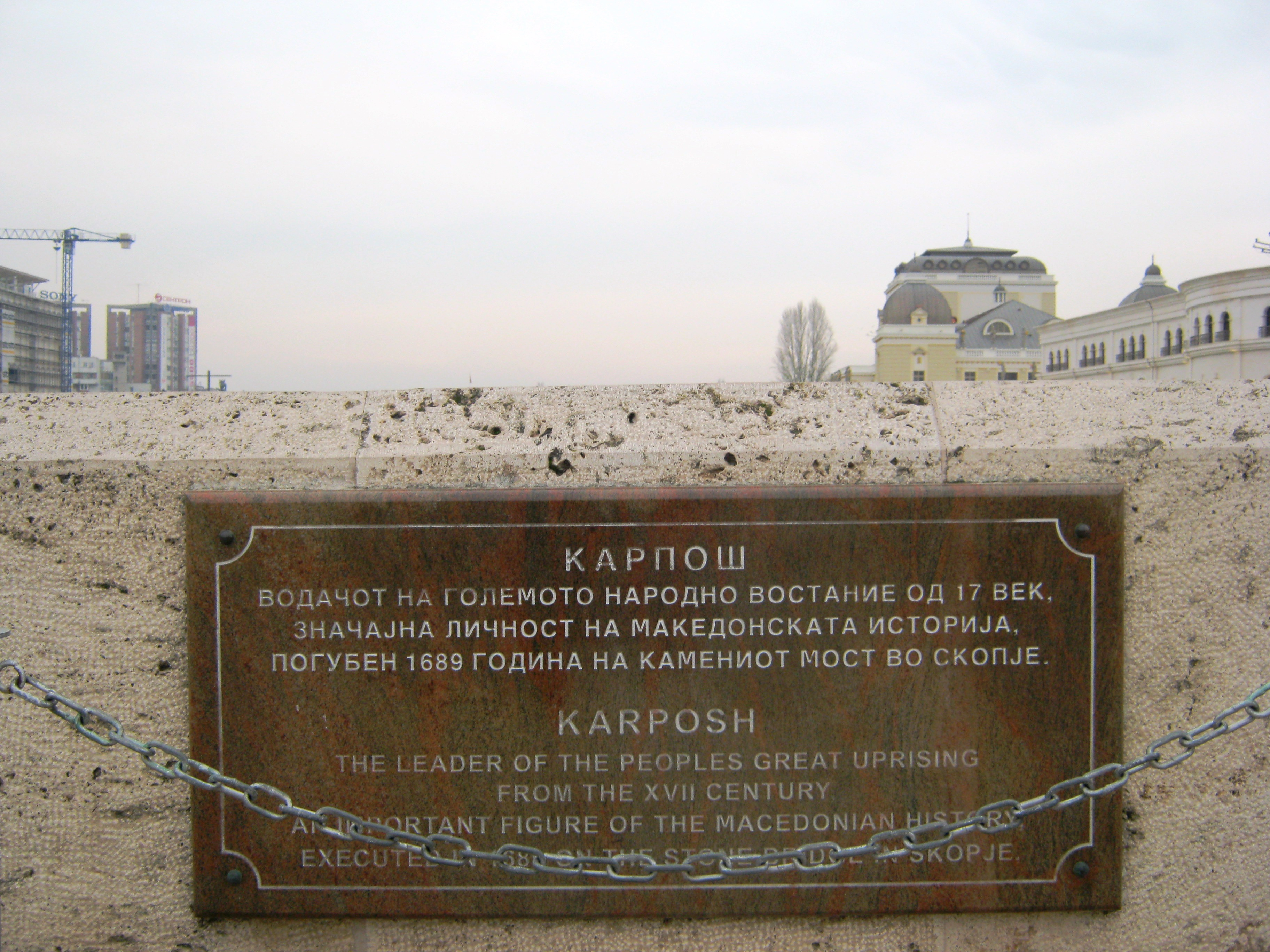 Меморијална плоча на Карпош на Камениот мост во Скопје